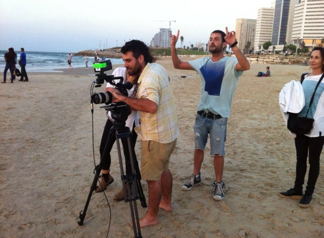 אלעד זכאי באתר הצילומים